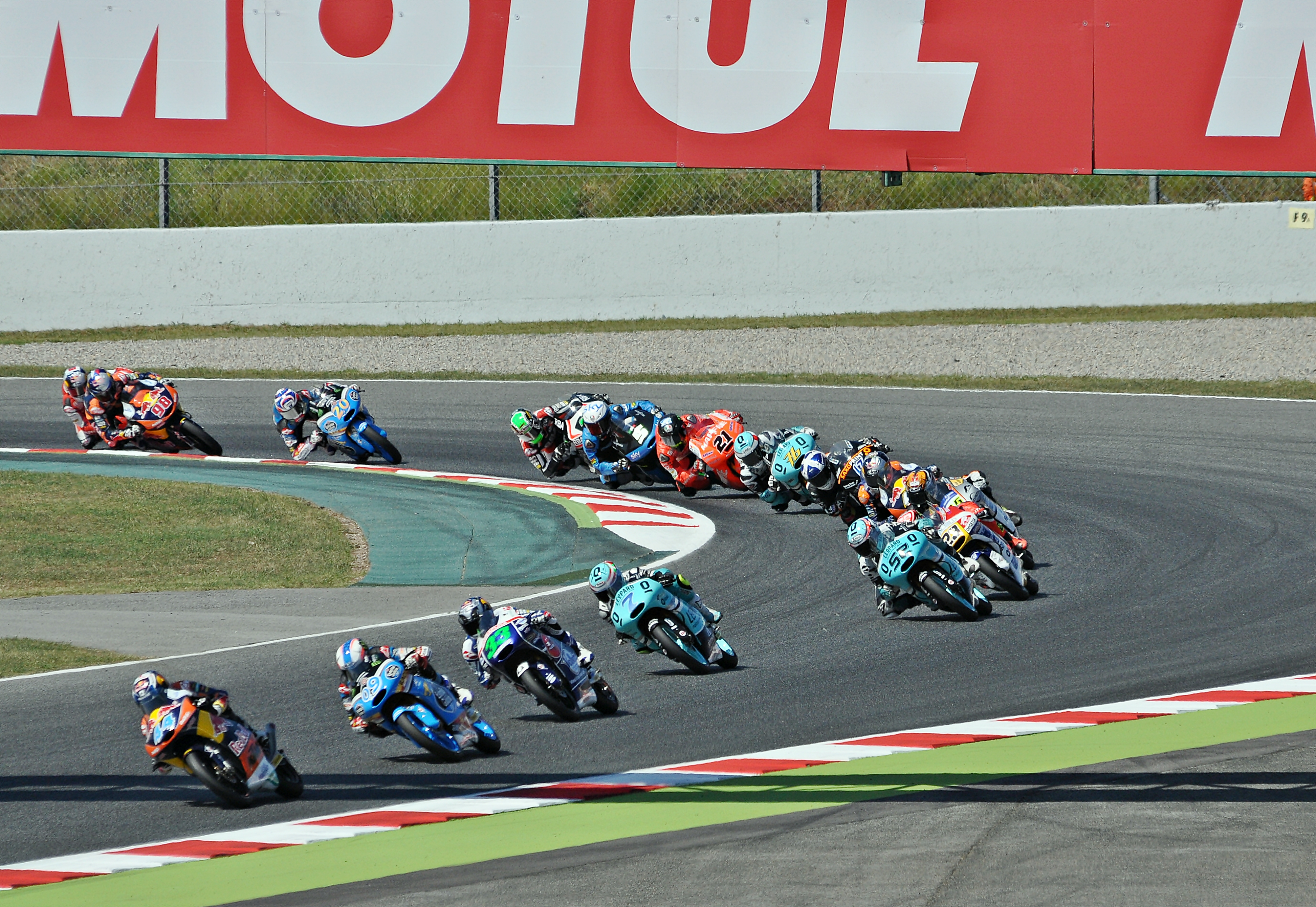 gran premio de cataluña